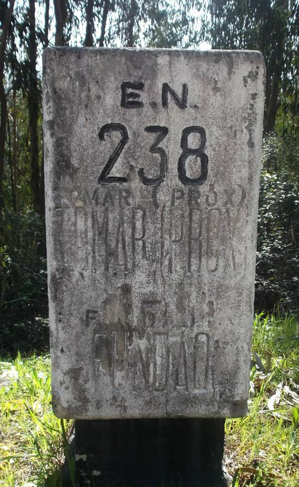 foto do marco kilometrico